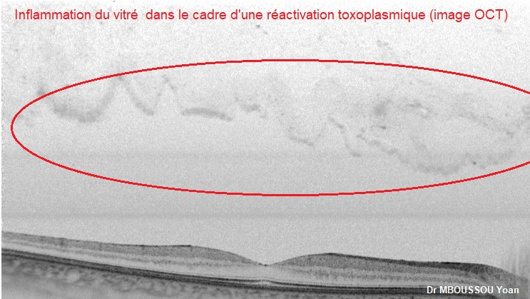 Inflammation du vitrée au cours d'une infection à la toxoplasmose